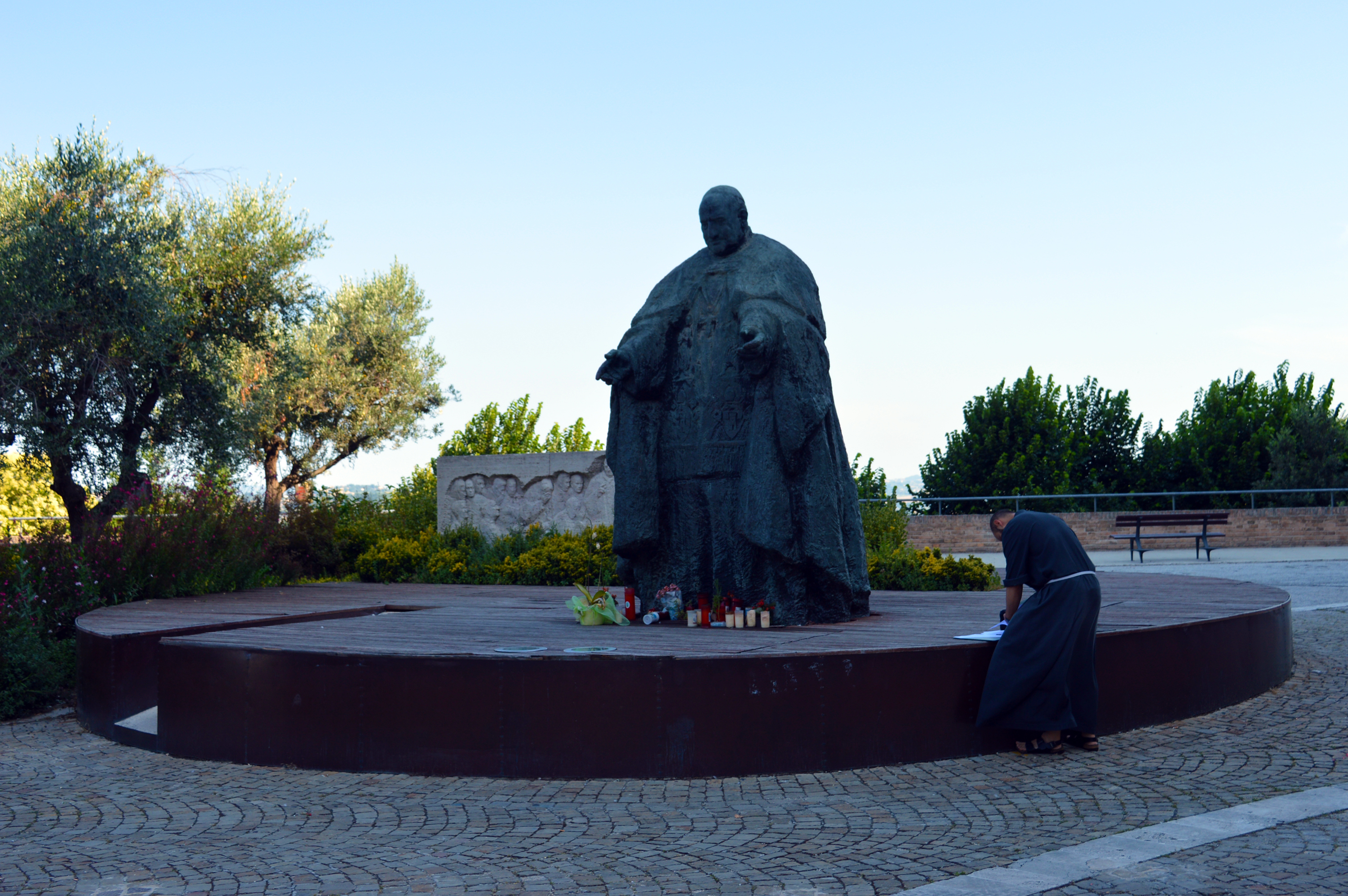 Foto scattata a Loreto